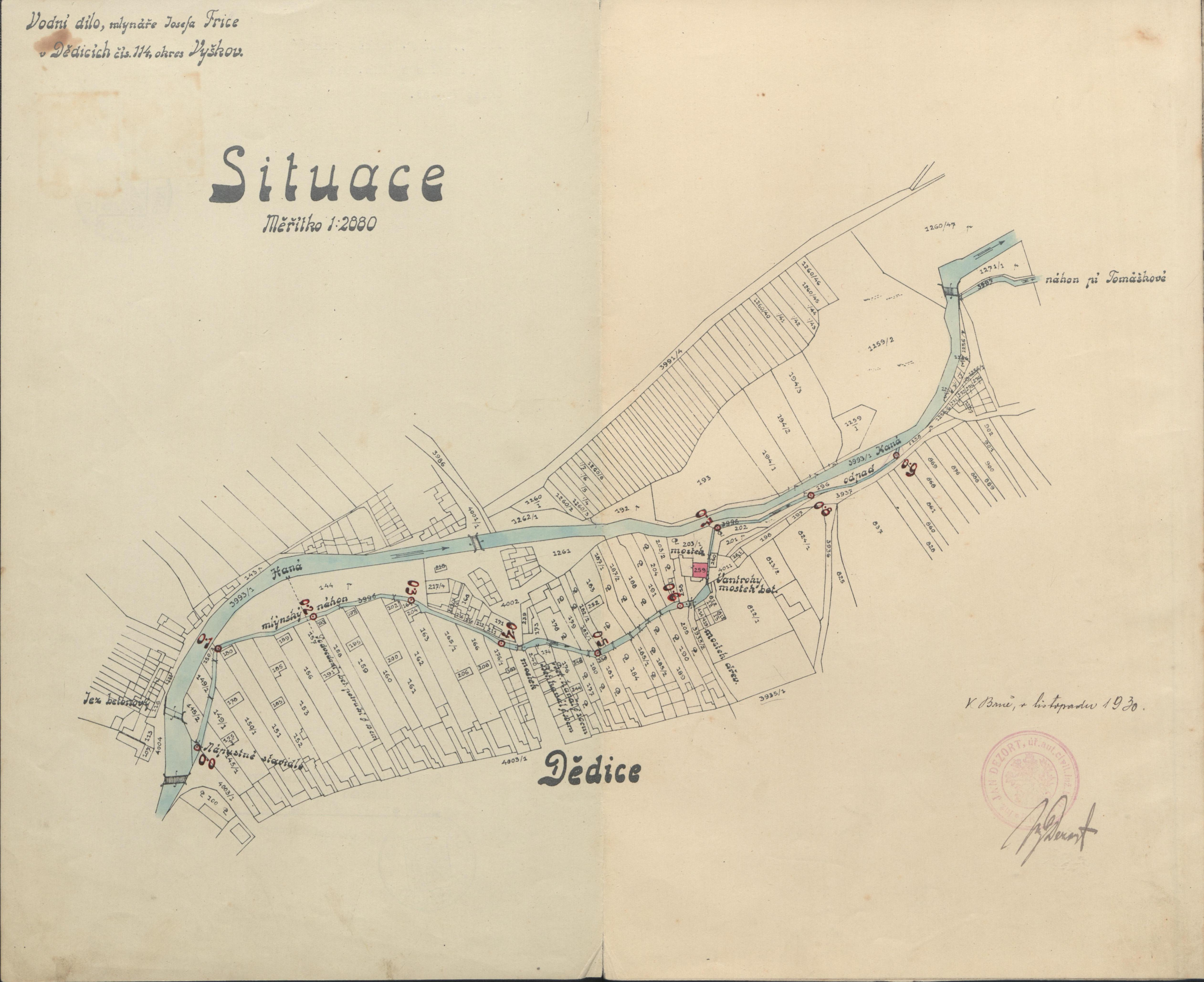 Vodní dílo, mlynáře Josefa Frice, situace, listopad 1930